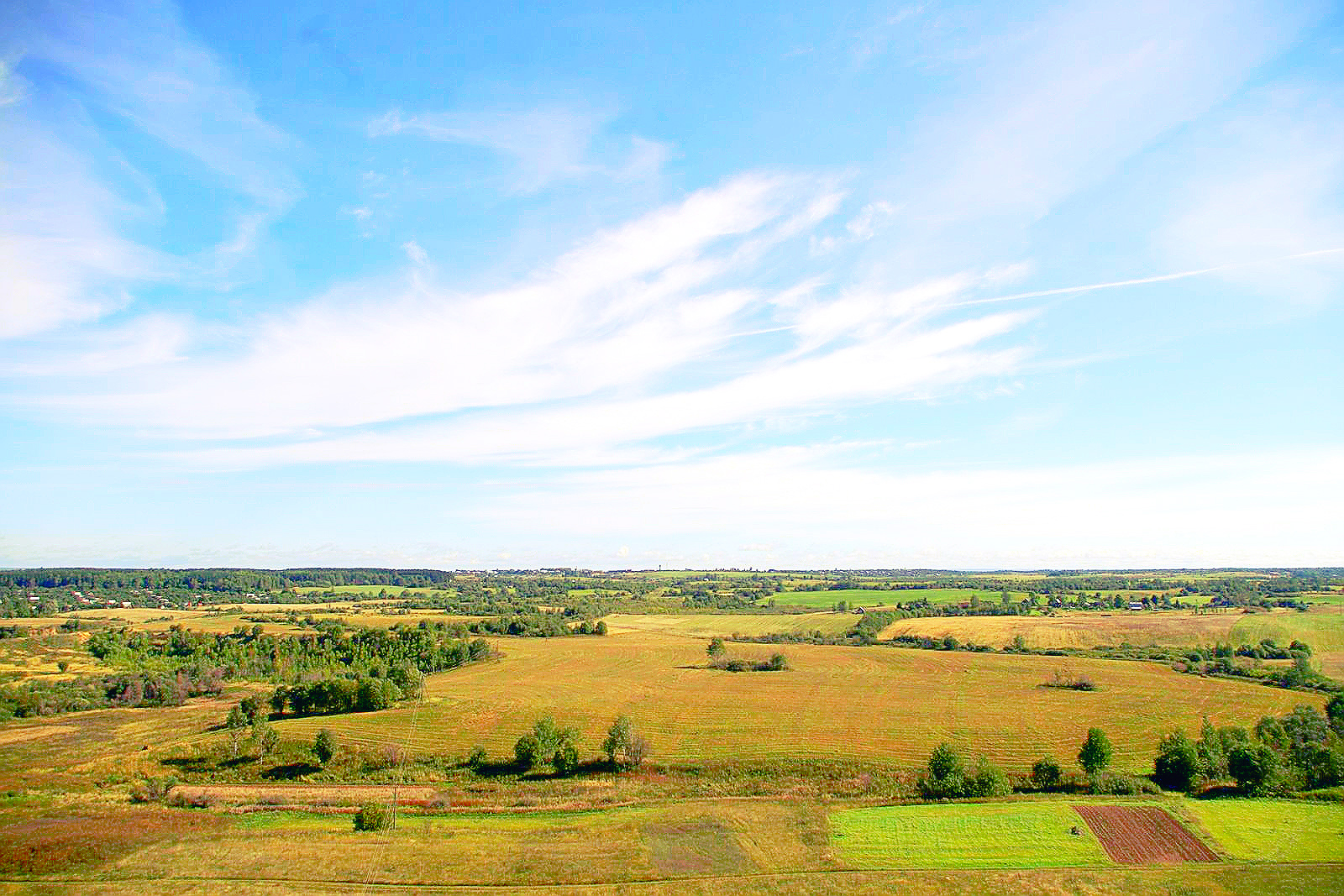 Панорама Великолукского района